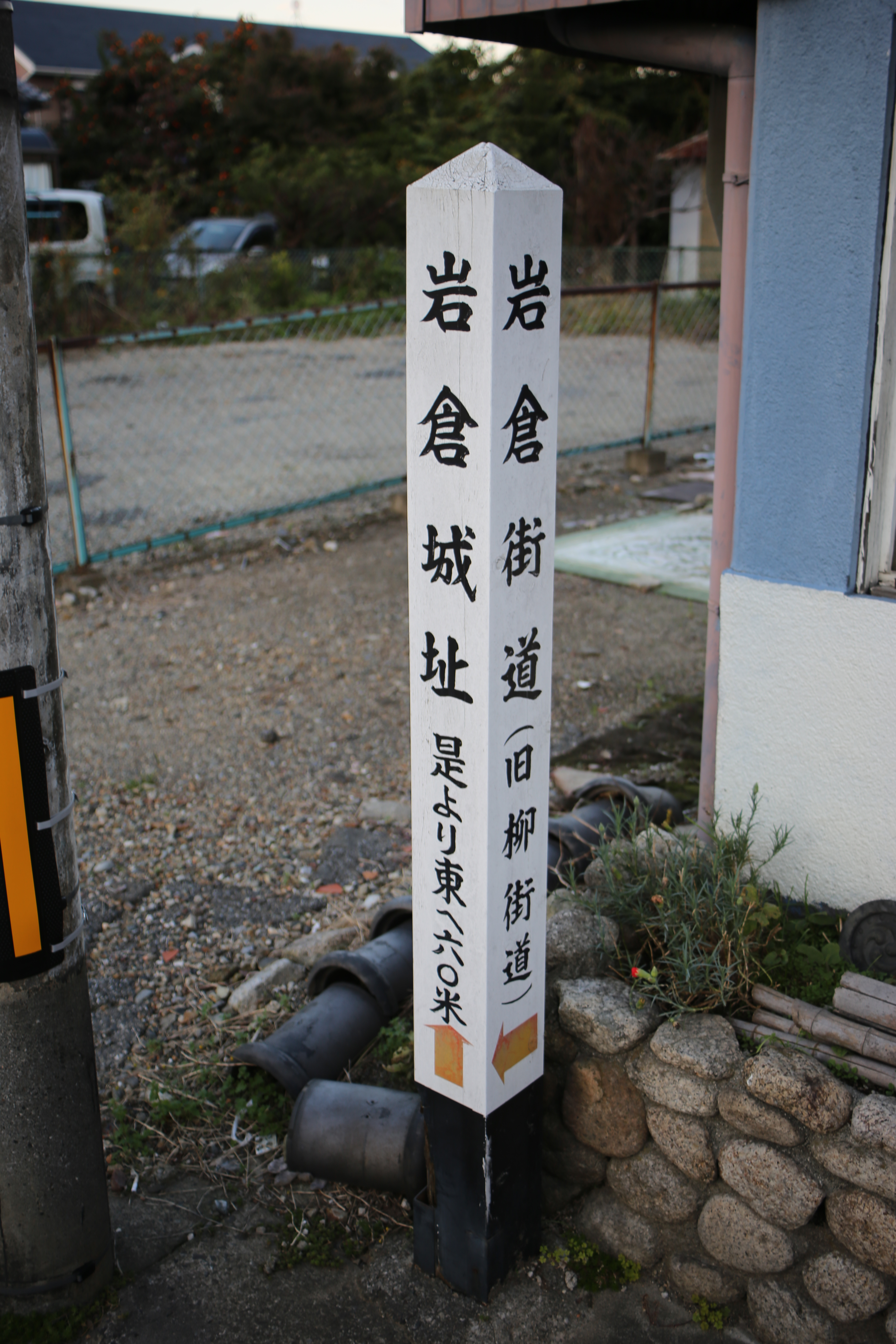 岩倉街道（旧柳街道）・岩倉城址を案内する標柱